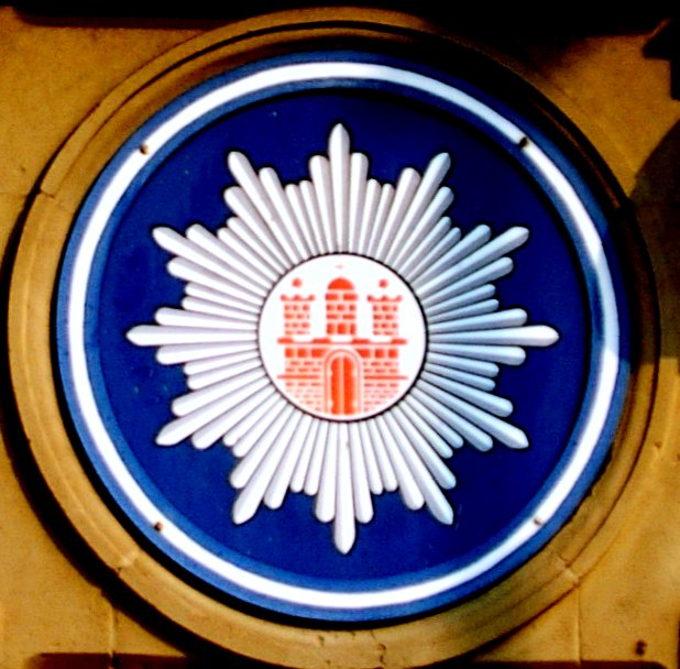 Hamburg, Wache Mundsburg, Detail